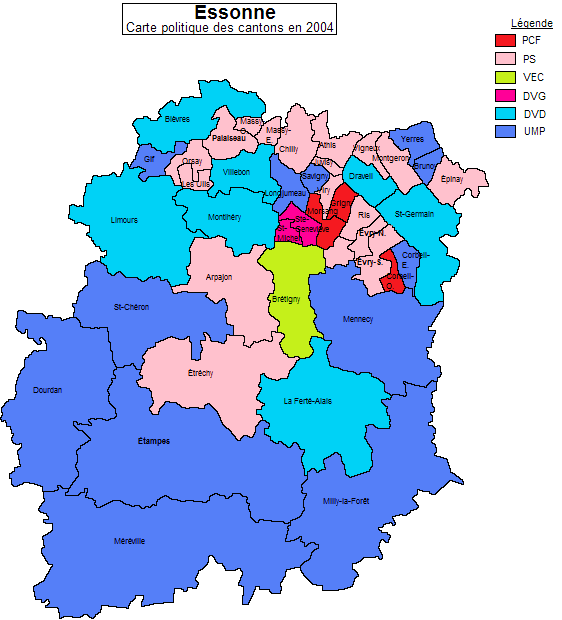 Carte politique des cantons de l'Essonne en 2004.